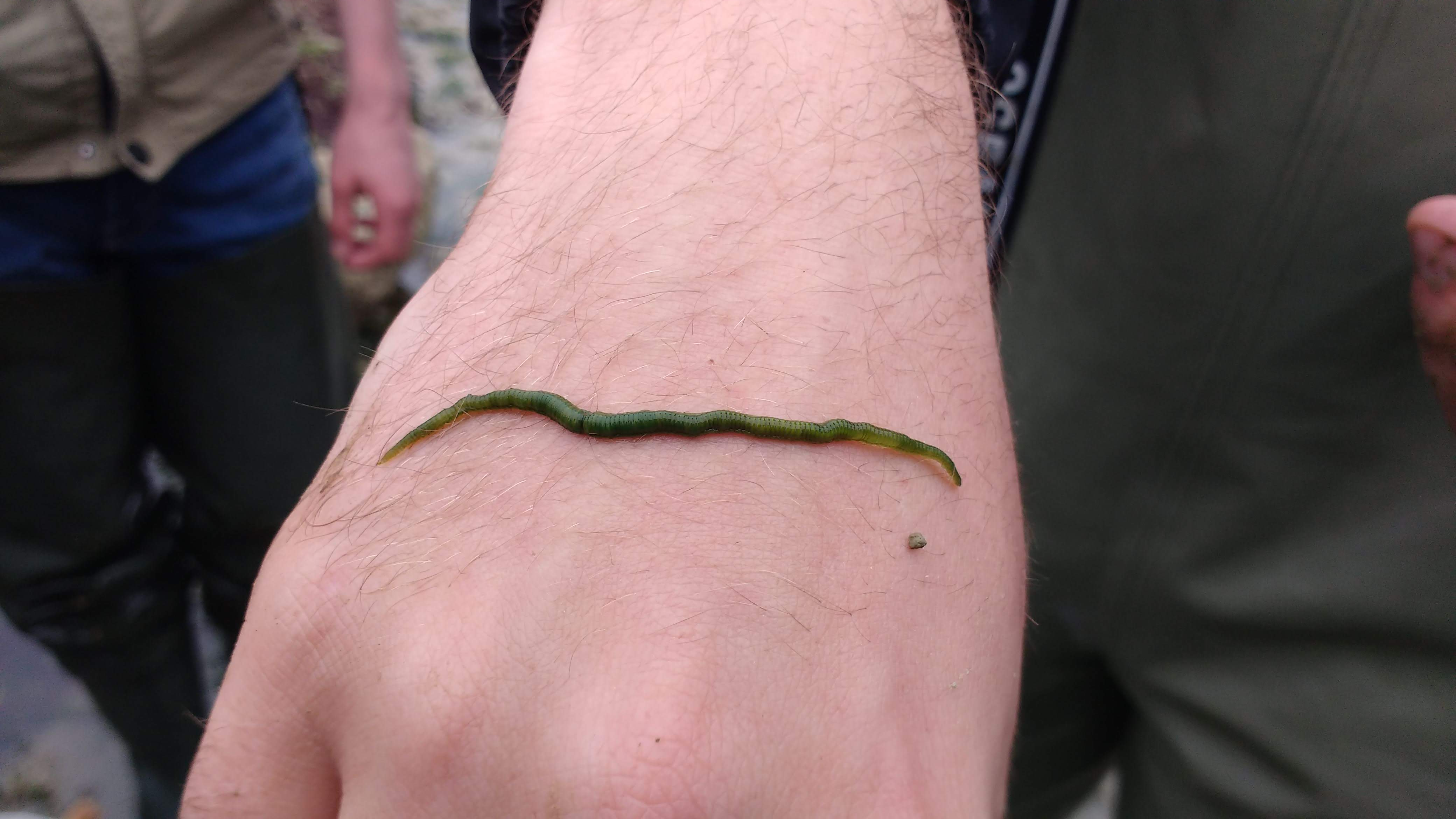 Eulialia viridis, found in may 2018 near Wimereux